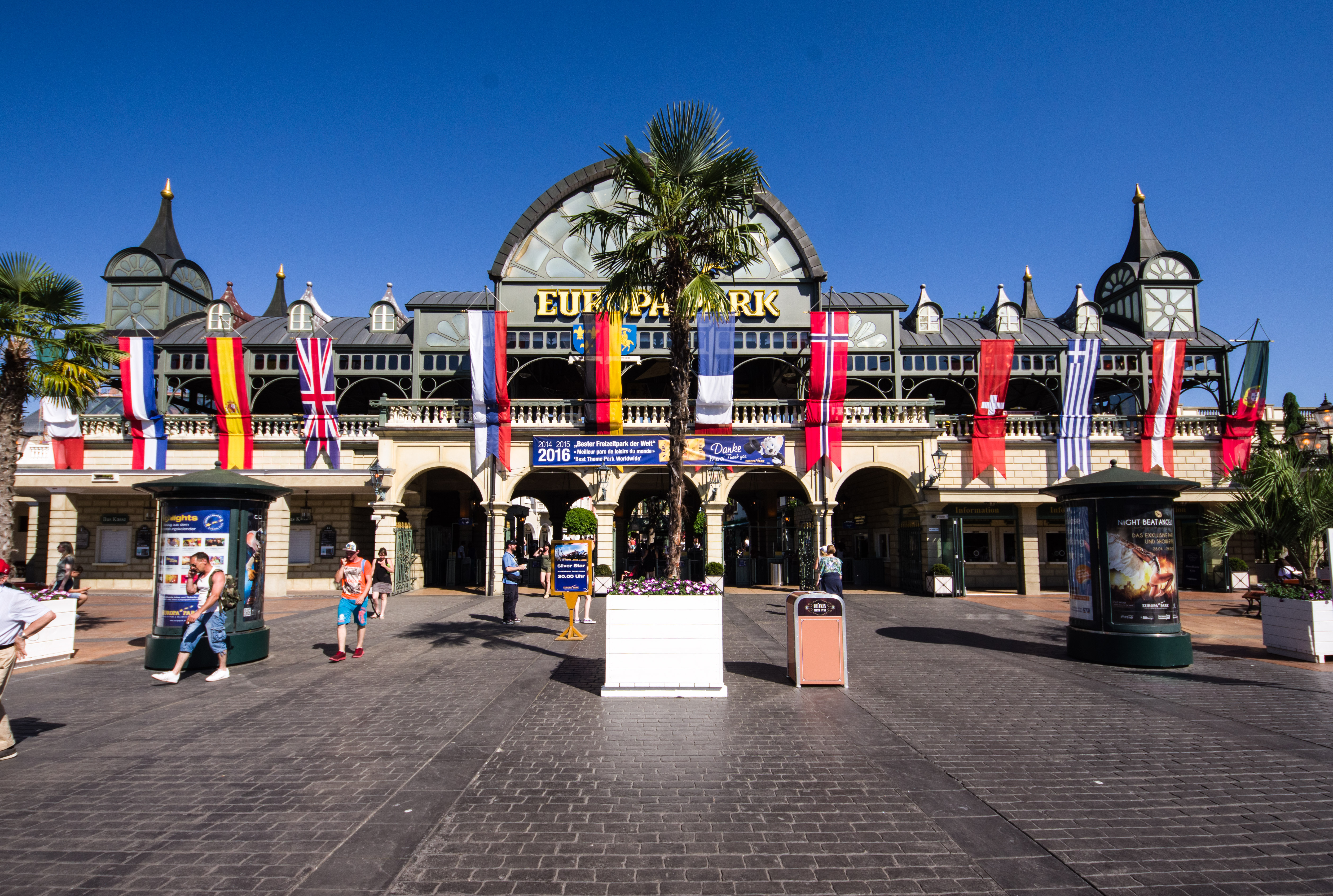 Haupteingang Europa-Park Rust